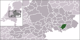 Locatie gemeente Wisch. Afbeelding gemaakt door gebruiker:Mtcv en vrij te gebruiken.